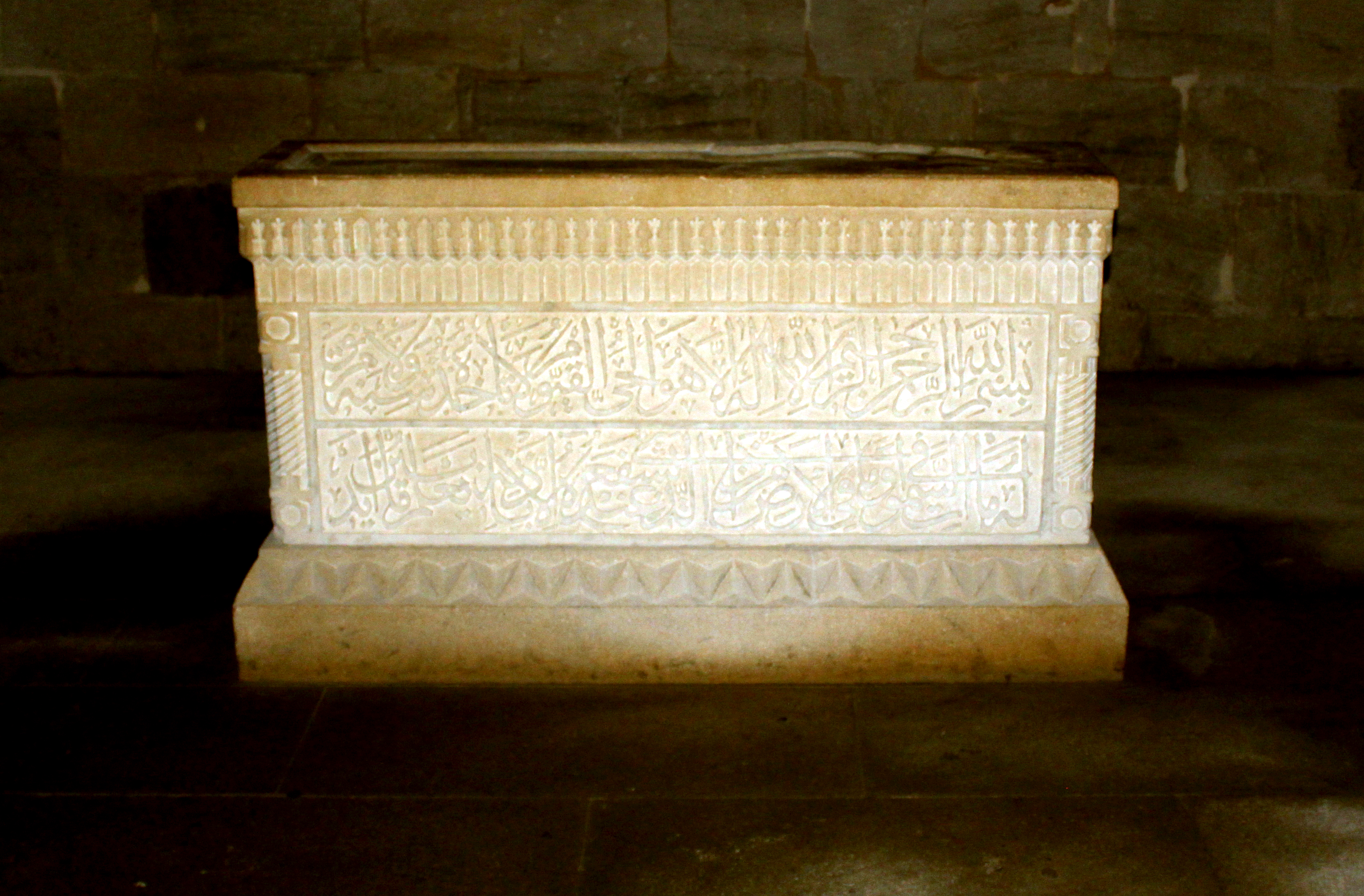 Seyid Yəhya Bakuvinin məzarı